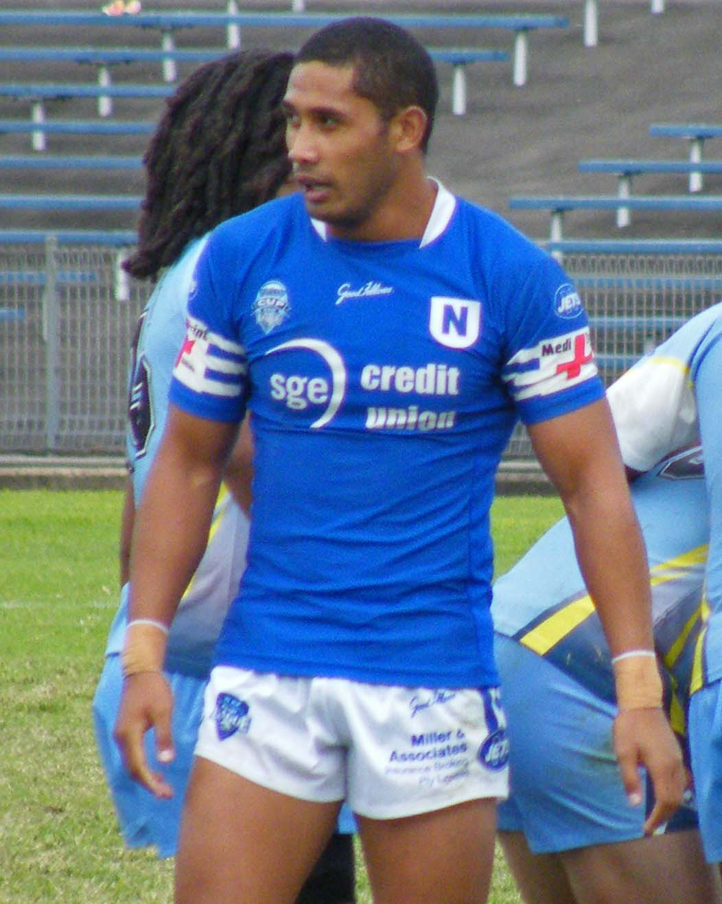 Francis vaiotu